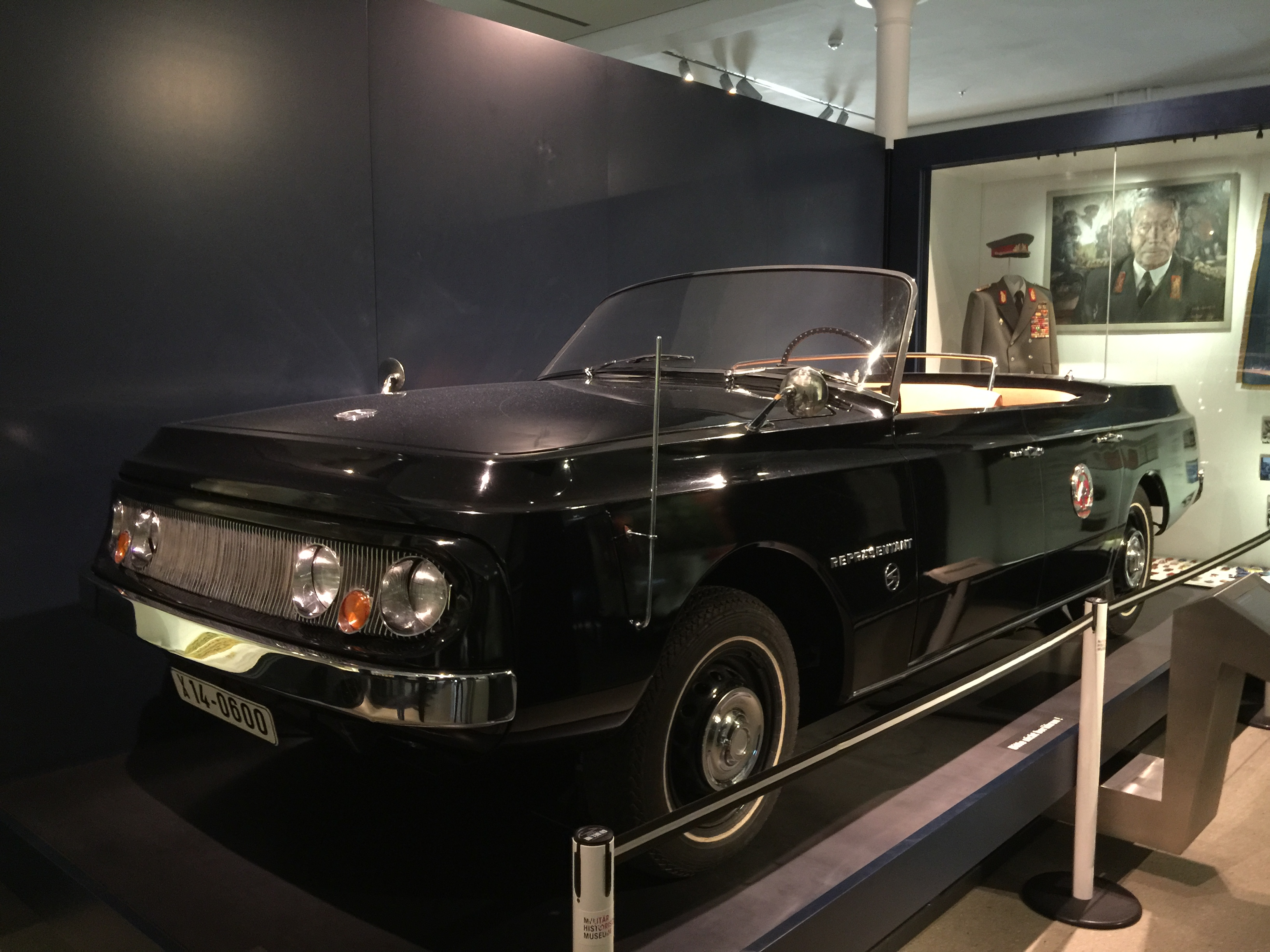 Sachsenring P240